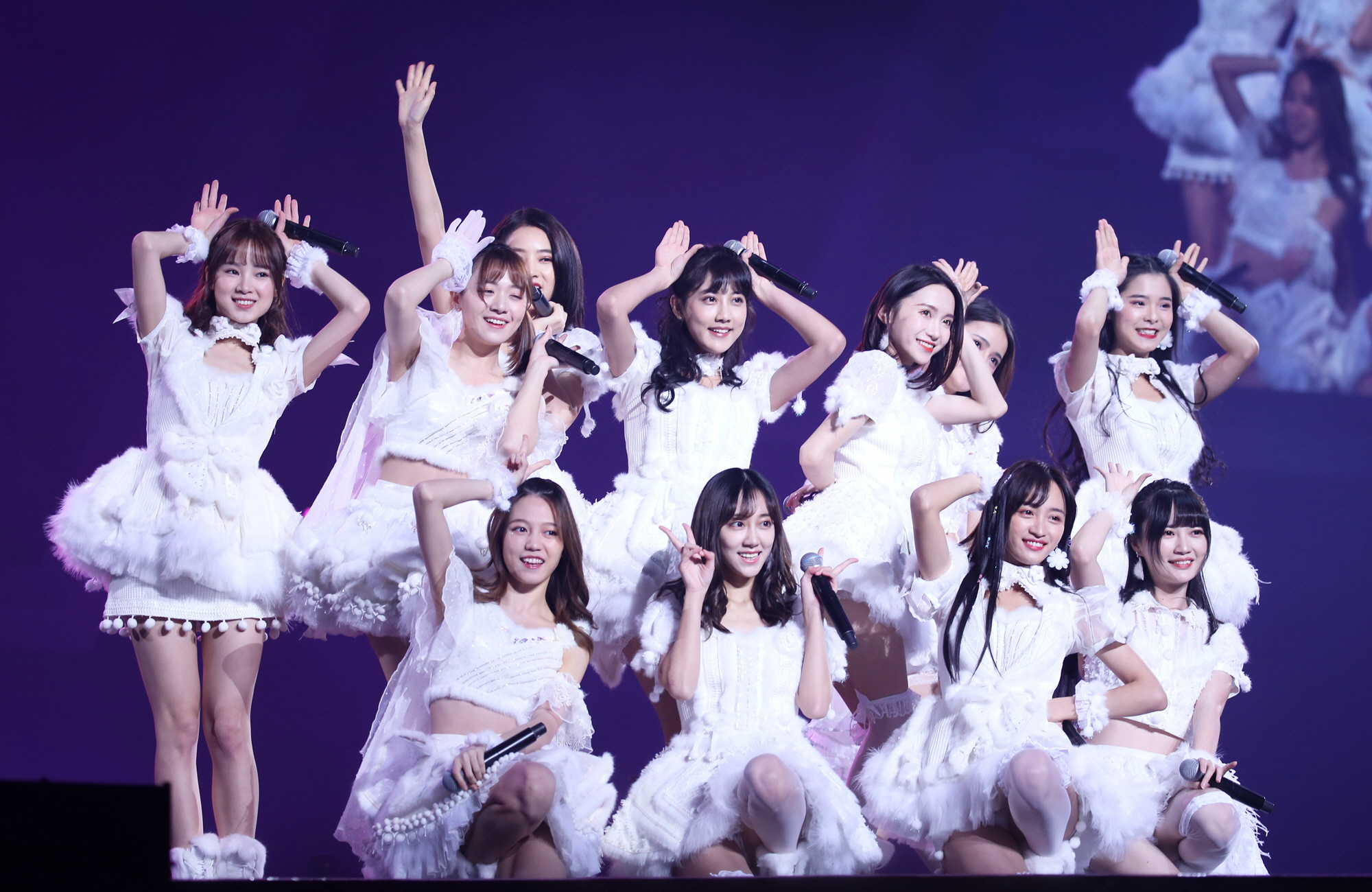 咪咕音乐盛典